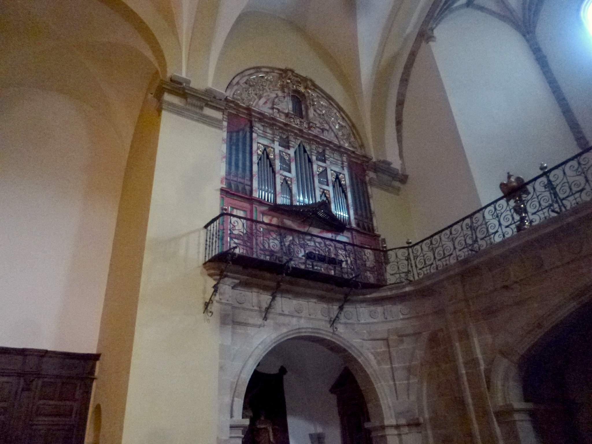 Iglesia de San Martín, Ataun (Guipúzcoa)